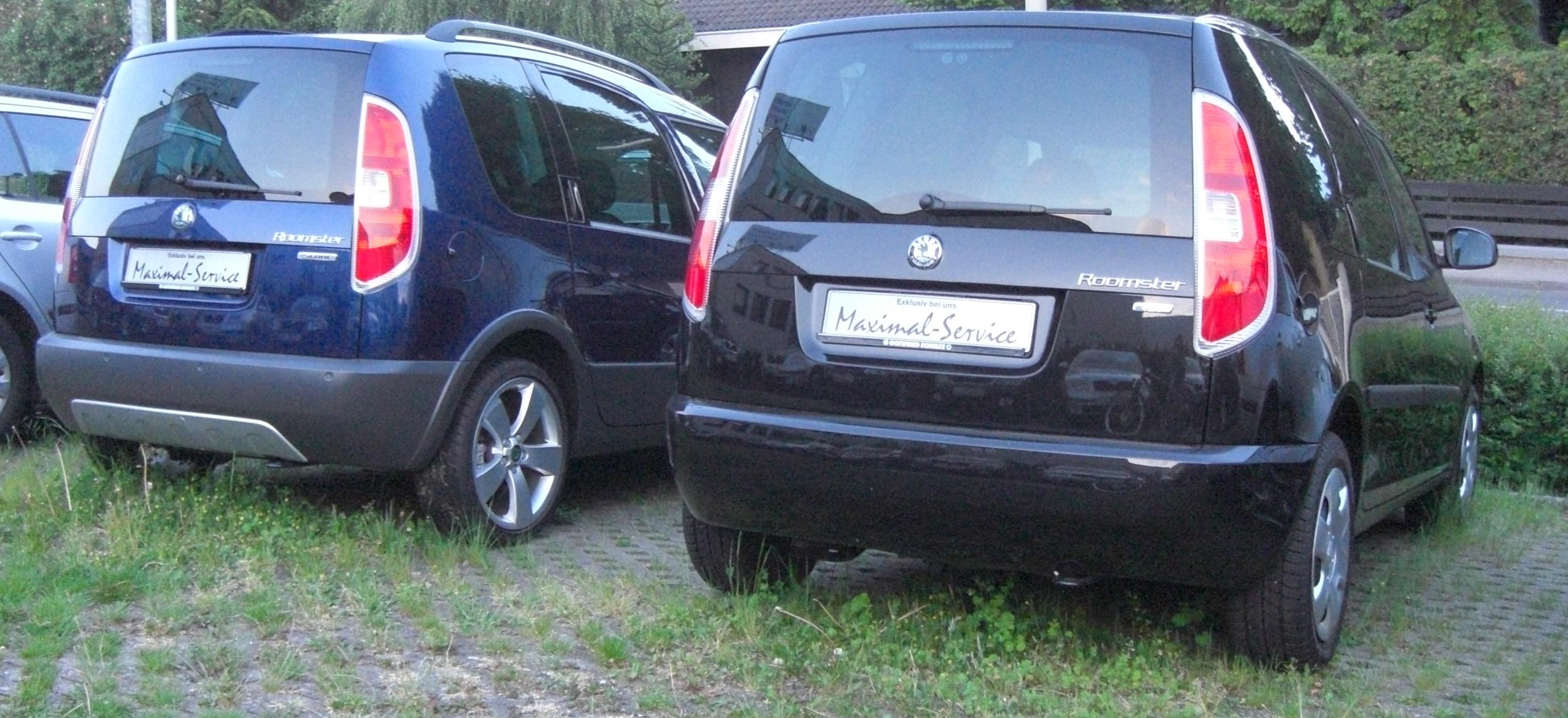 Skoda Roomster(s)